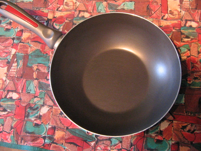 Posoda vok.